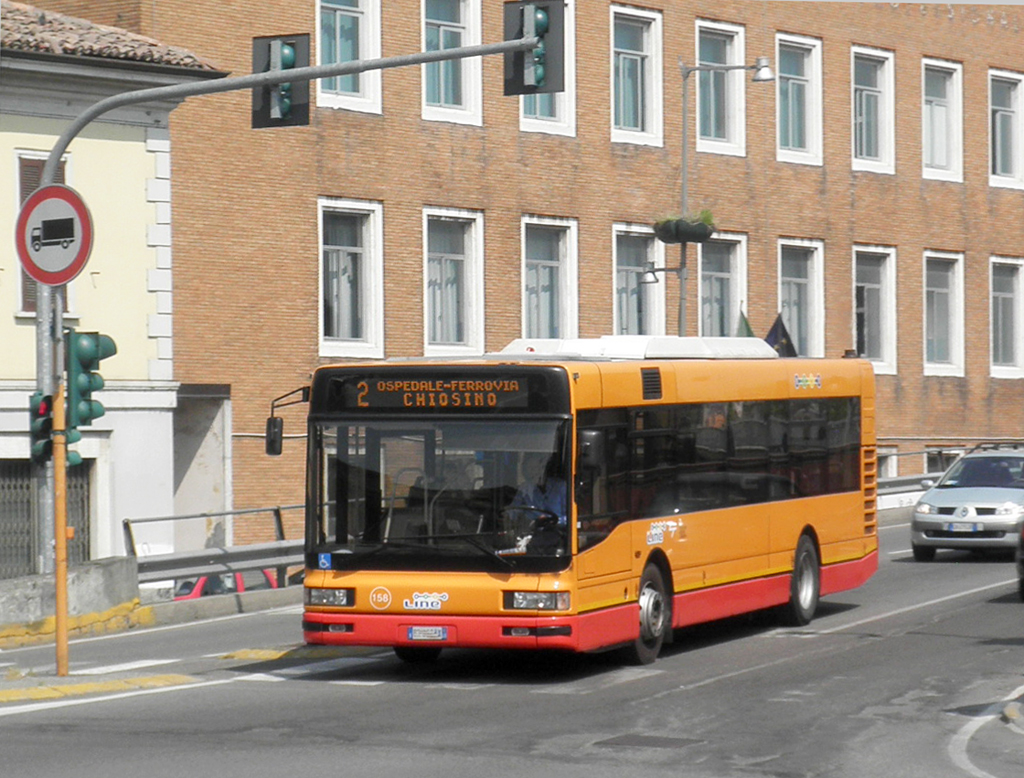 Autobus del servizio urbano di Lodi all'imbocco del ponte Napoleone Bonaparte.